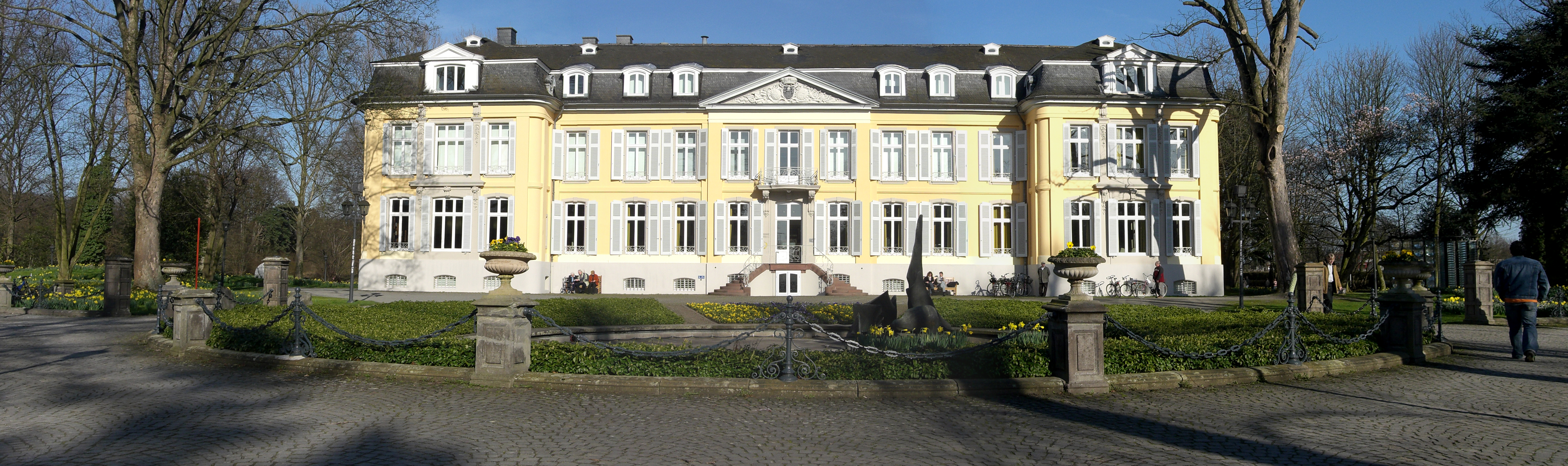 Panoramaaufnahme des Schloss Morsbroich in Leverkusen/Germany with on the extreme left: Maßlos (Vertikal ROT) from 1991 by Lutz Fritsch